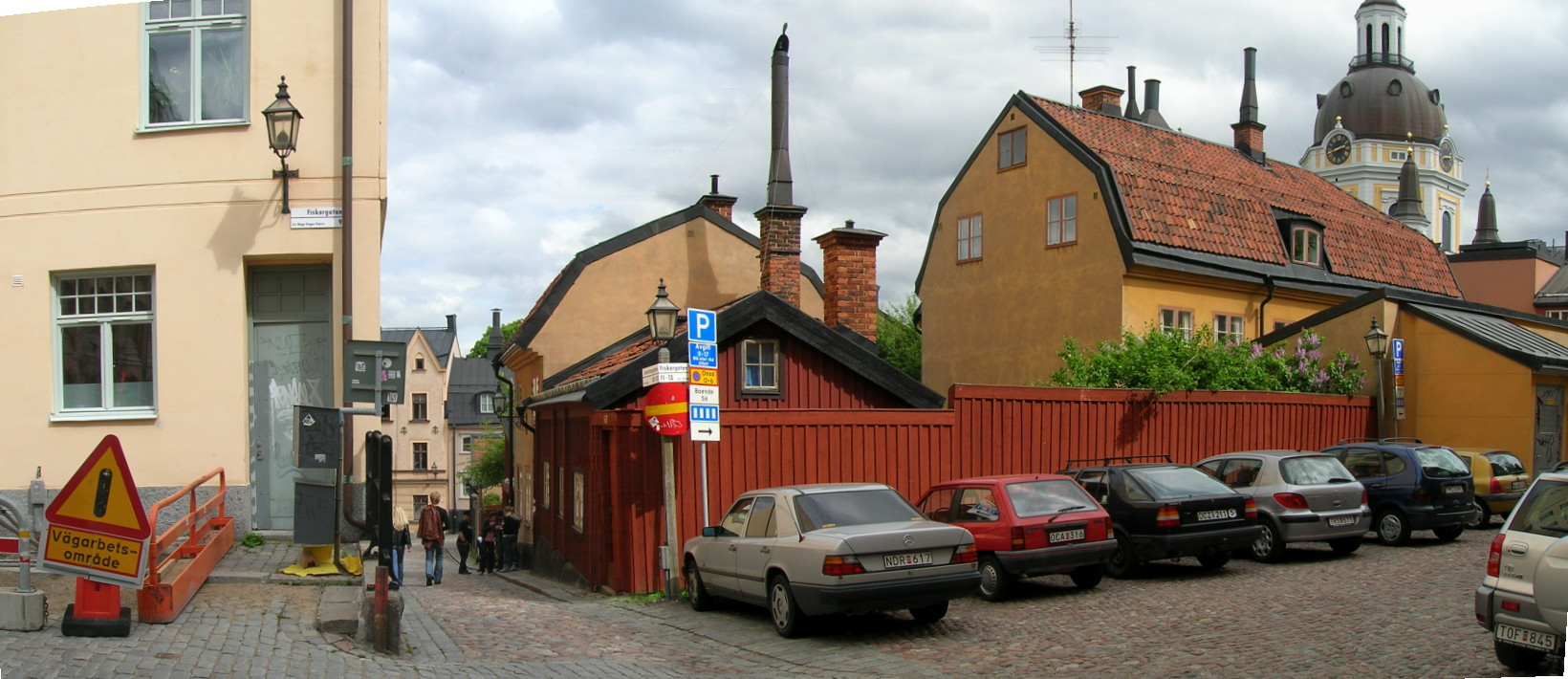 Fiskargatan, Stockholm, Sweden